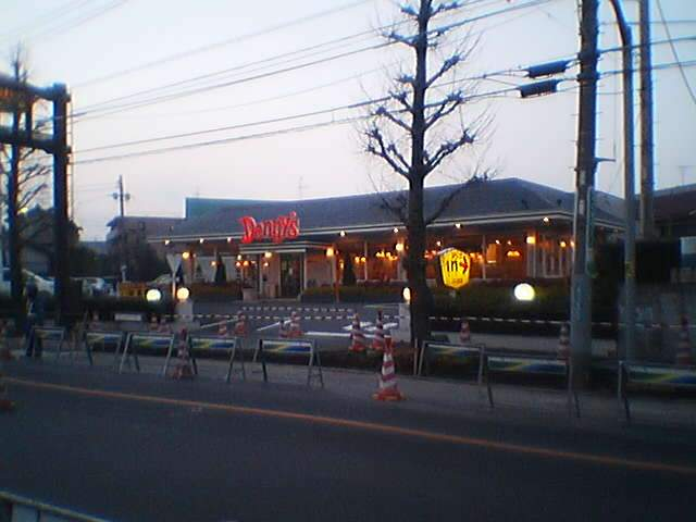 世田谷通り デニーズ 狛江店